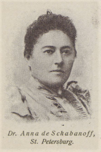 Dr. Anna de Schabanoff. St. Petersburg. Kaiserliche Staatsärztin. Präsidentin des 'Vereins der russischen Frauen' in St. Petersburg seit seiner Begründung